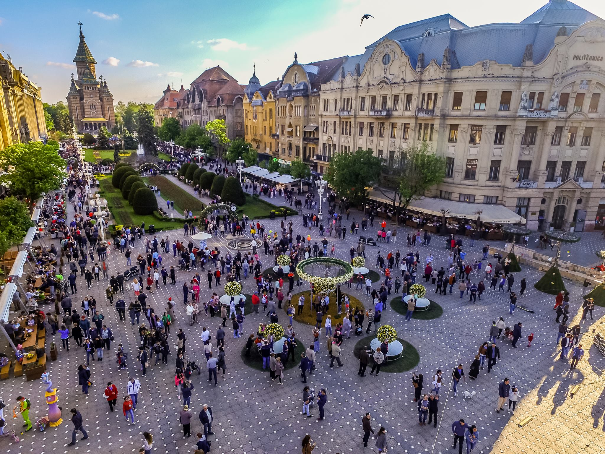 Piata Victoriei in vremea festivalului florilor TimFloralis